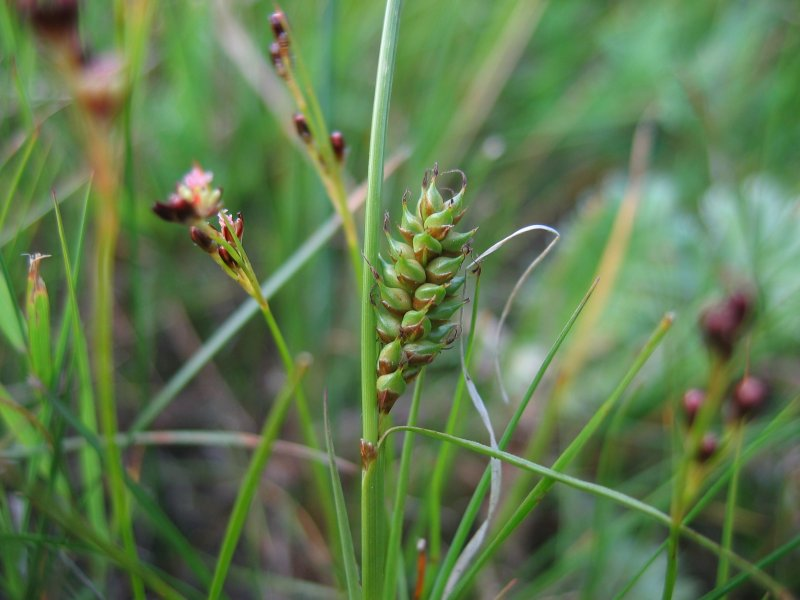 Untere weibliche Blüten der Entferntährigen Segge Carex distans, Zingst, salzbeeinflusste feuchte Stelle, im Hintergrund Juncus gerardii